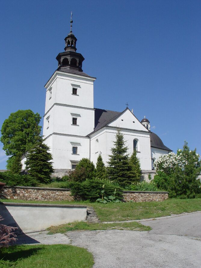 Szczaworyż k.Buska, Kościół, widok od południa